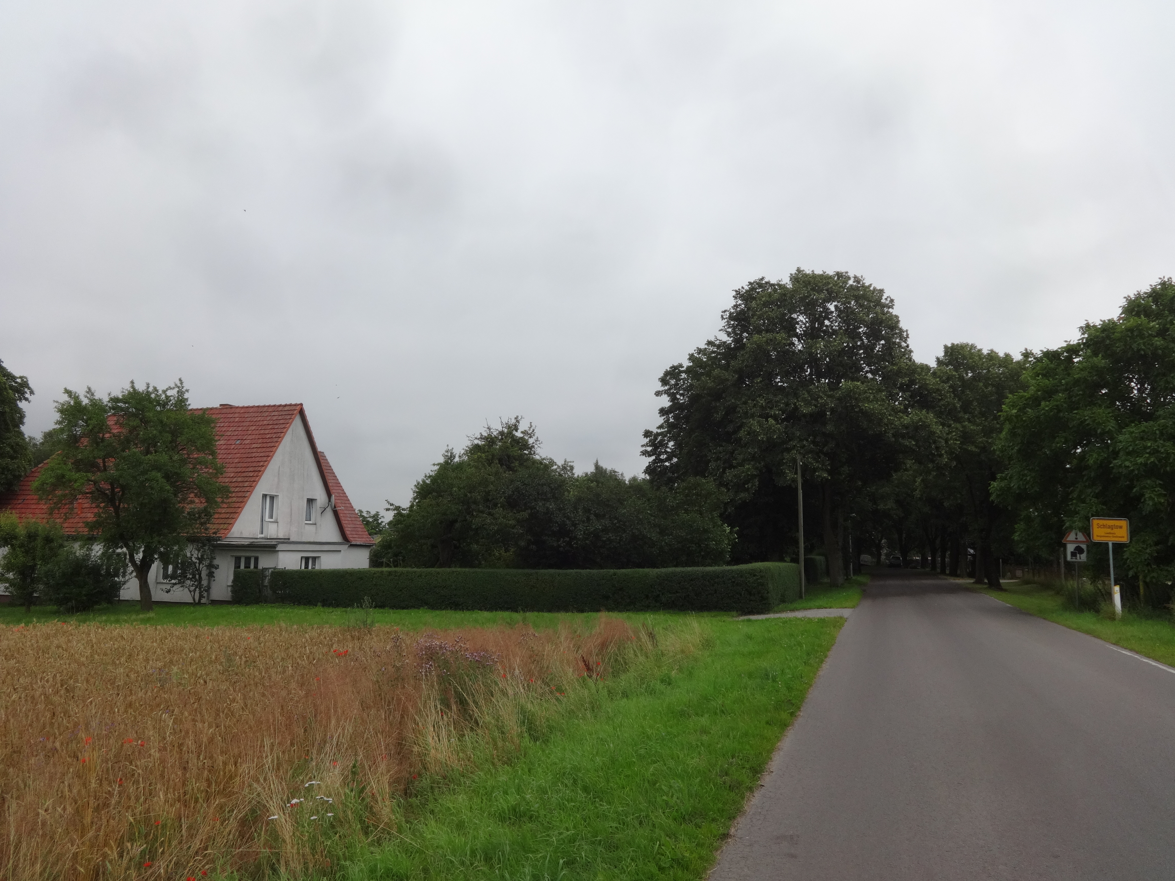 Ortseingang von Schlagtow, einem Ortsteil der Gemeinde Groß Kiesow im Landkreis Vorpommern-Greifswald in Mecklenburg-Vorpommern.